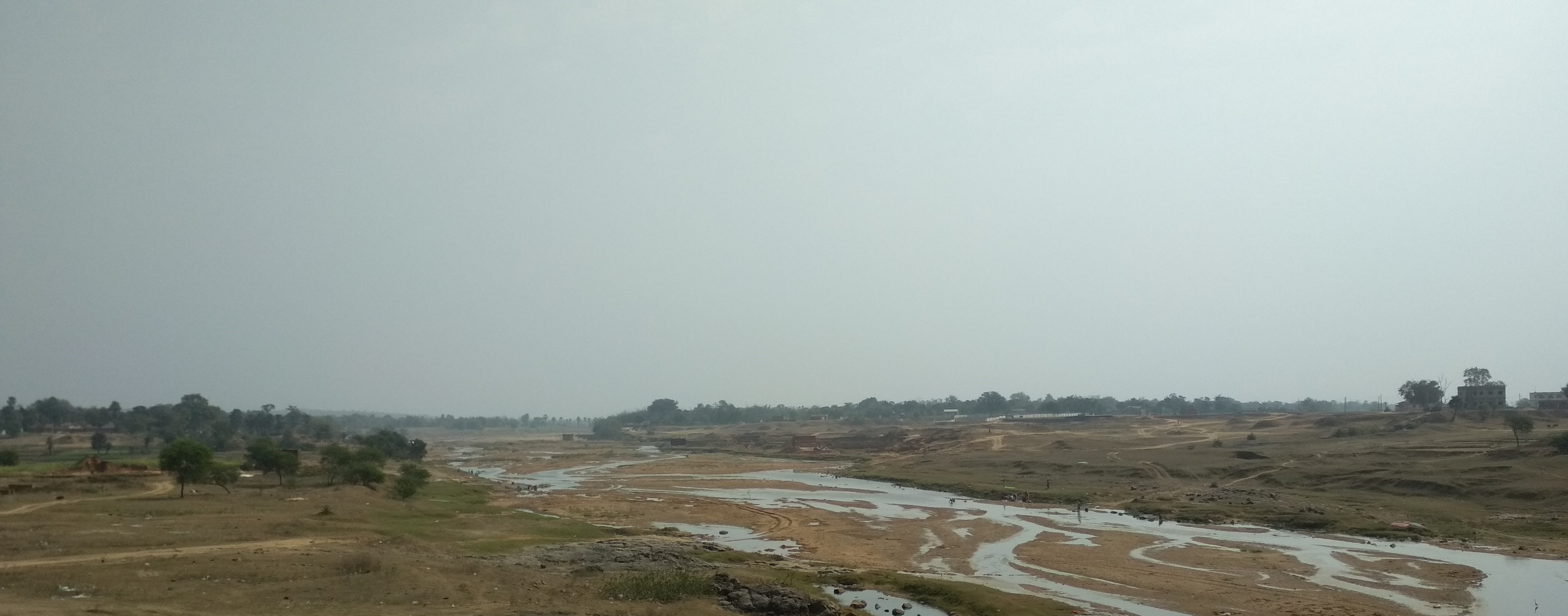 ब्राह्मणी नदी